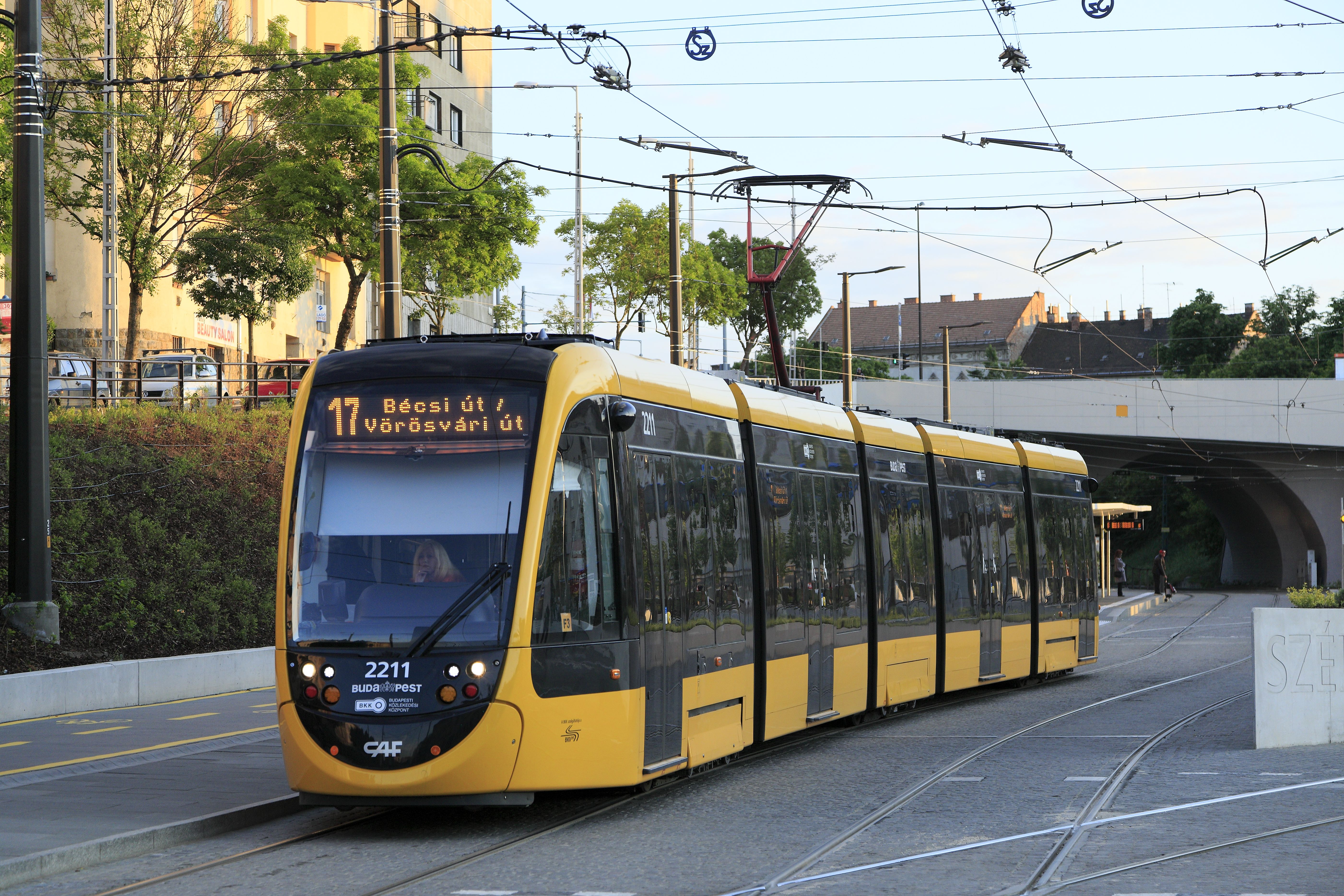 »Urbos 3« von CAF, Linie 17 Savoya Park–Bécsi út (Wiener Straße) beim Verlassen der Haltestelle Széll Kálmán tér Richtung Margit körút